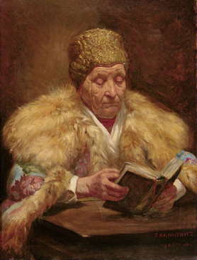 FRANCISZEK JAN MACHNIEWICZ. CZYTAJĄCA